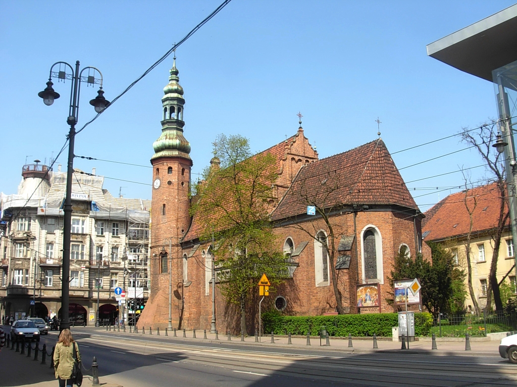 Kościół p.w. Wniebowzięcia Najświętszej Marii Panny w Bydgoszczy (zbud. 1582-1615, do 1835 r. kościół klasztorny klarysek bydgoskich)